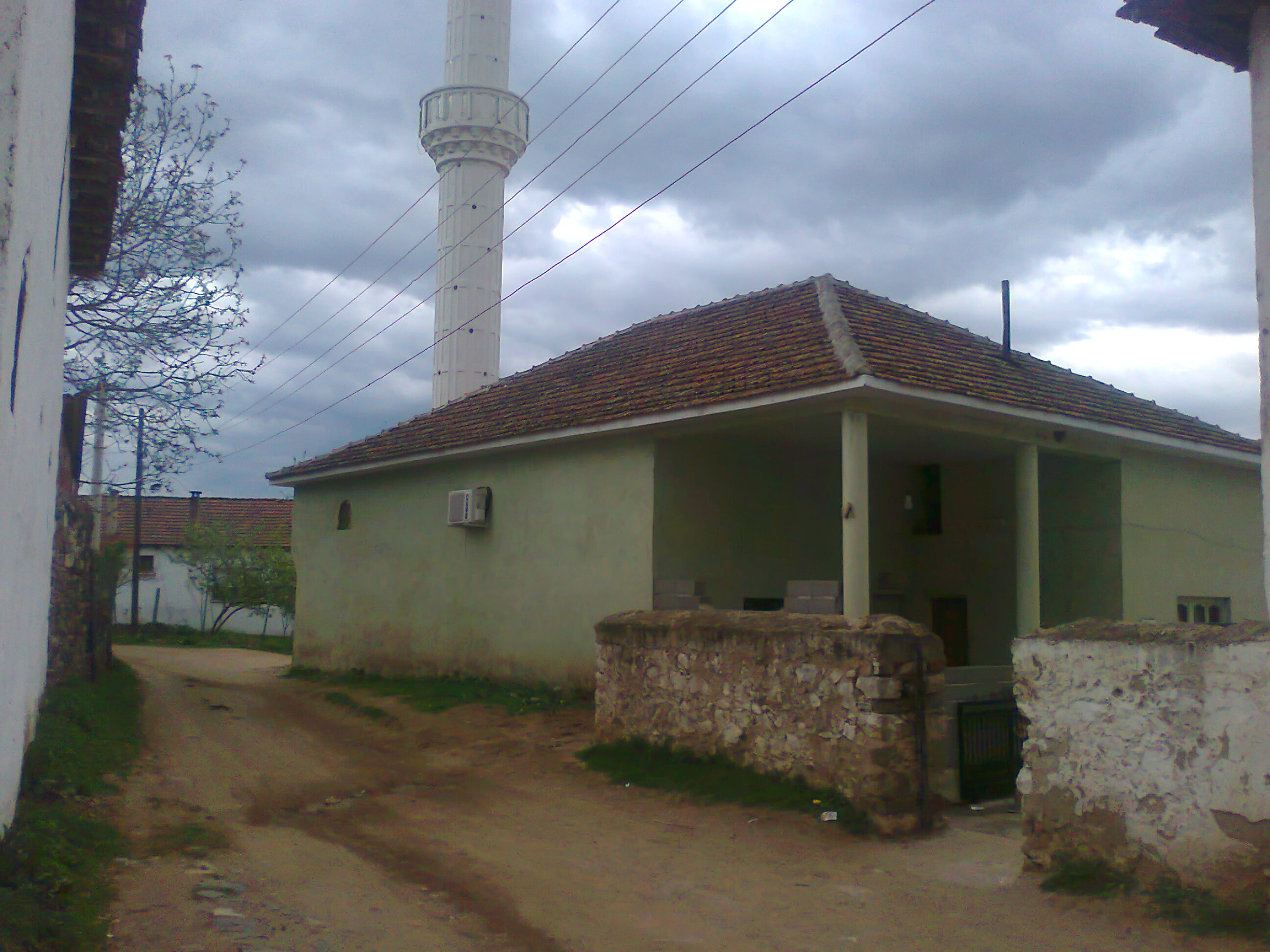 Dedelis mosque